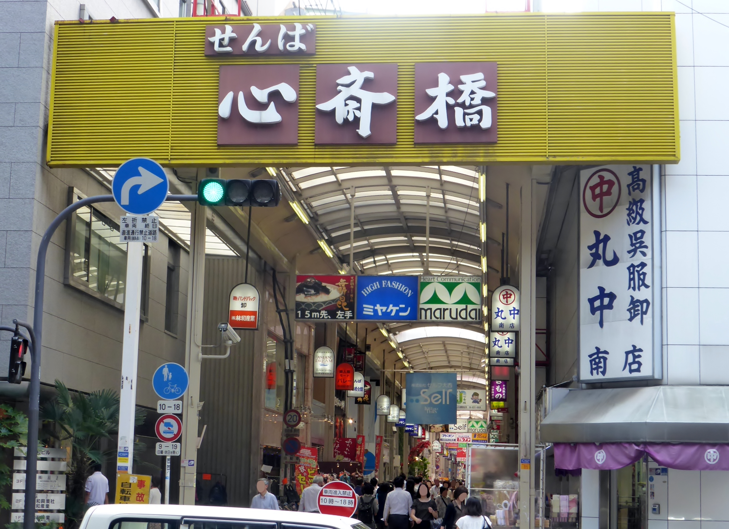 せんば心斎橋の通りの門を撮影。